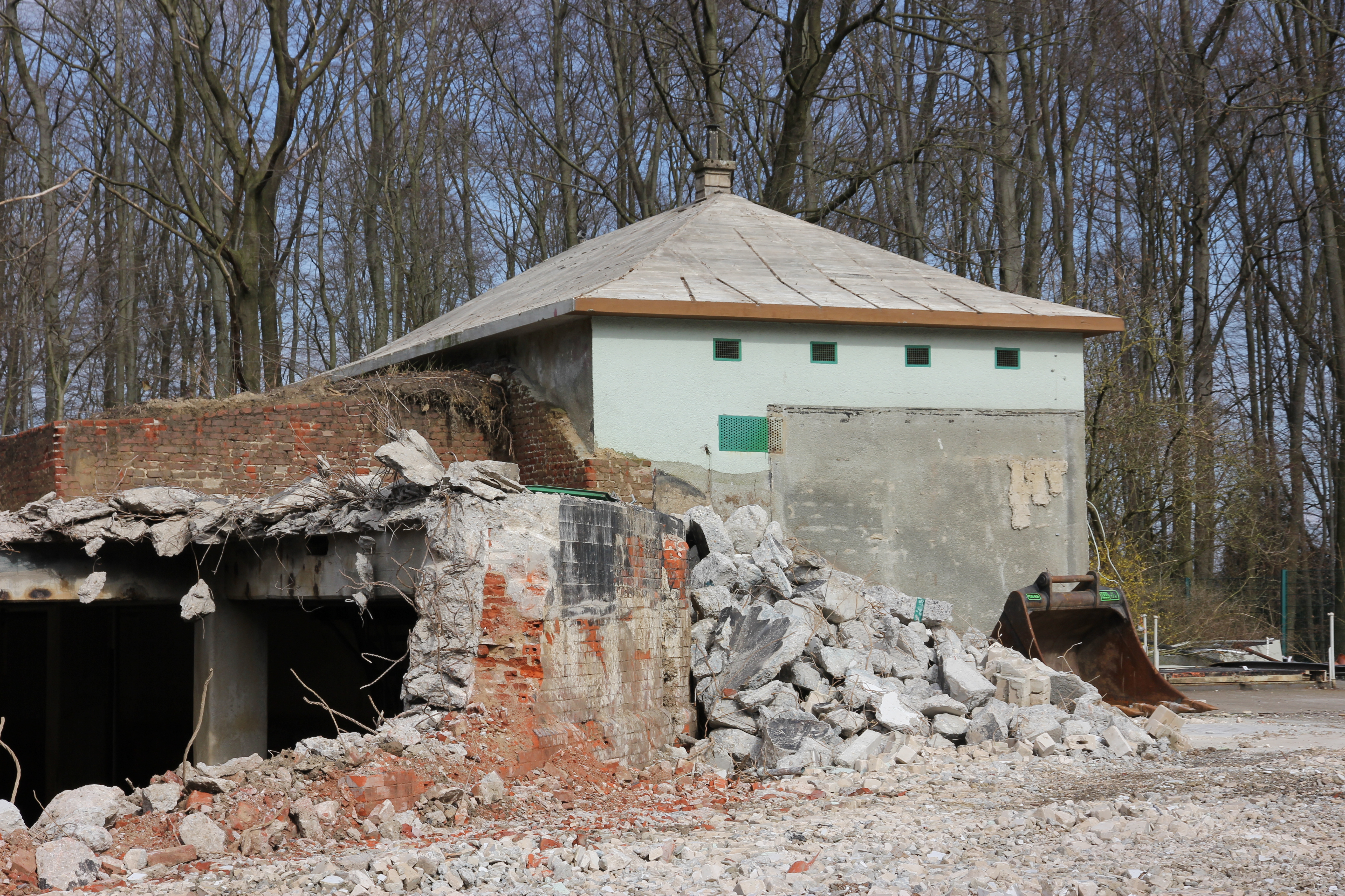 Abriss des Wasserbehälters Berghofen